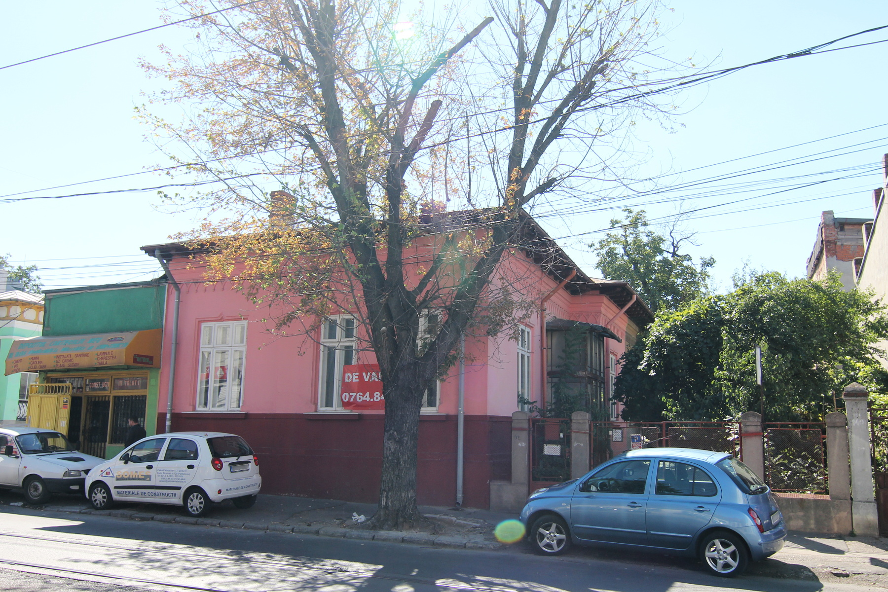 Casă pe Calea Călărașilor